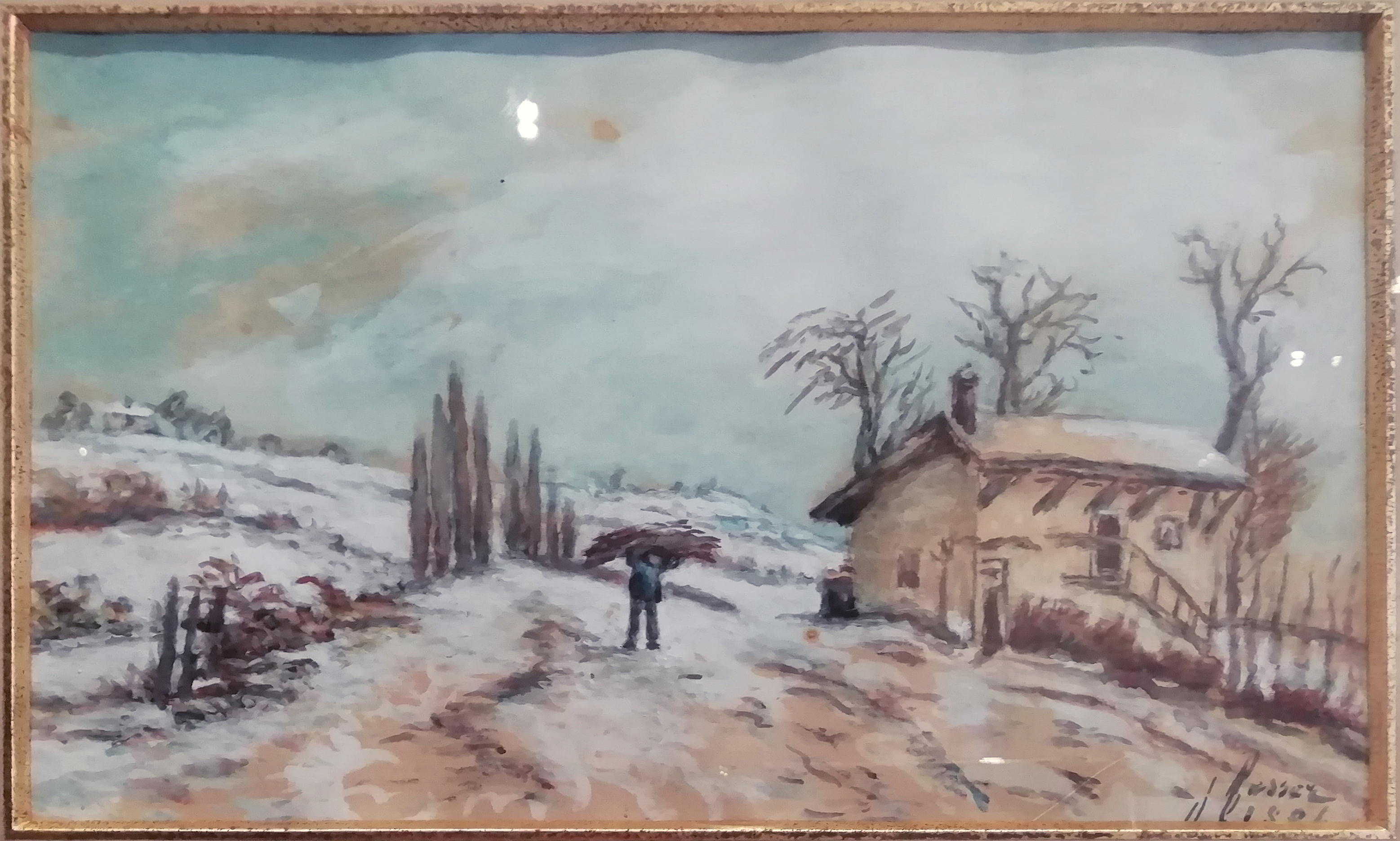 "La neige à la Côte-Saint-André" de Joséphine Fesser (1819-1891), aquarelle, 1886, 15,2x22,42. collection particulière. Expo "Jongkind et la famille Fesser : de la peinture à la photographie" à la Salle Jongkind de l'Hôtel de ville de La Côte Saint André. La Côte Saint André, Isère, AuRA, France.